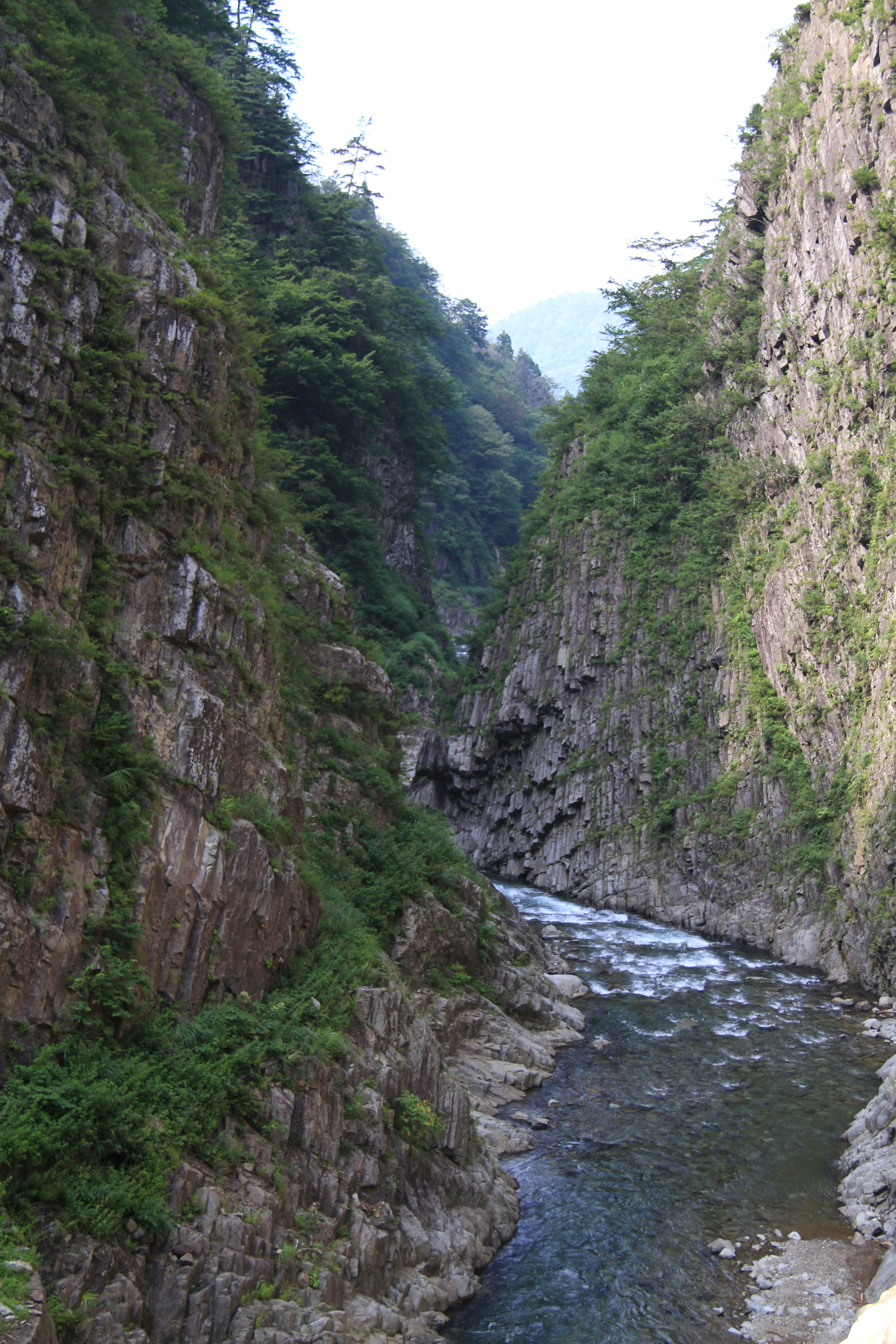 Tokamachi, Niigata Prefecture, Japan